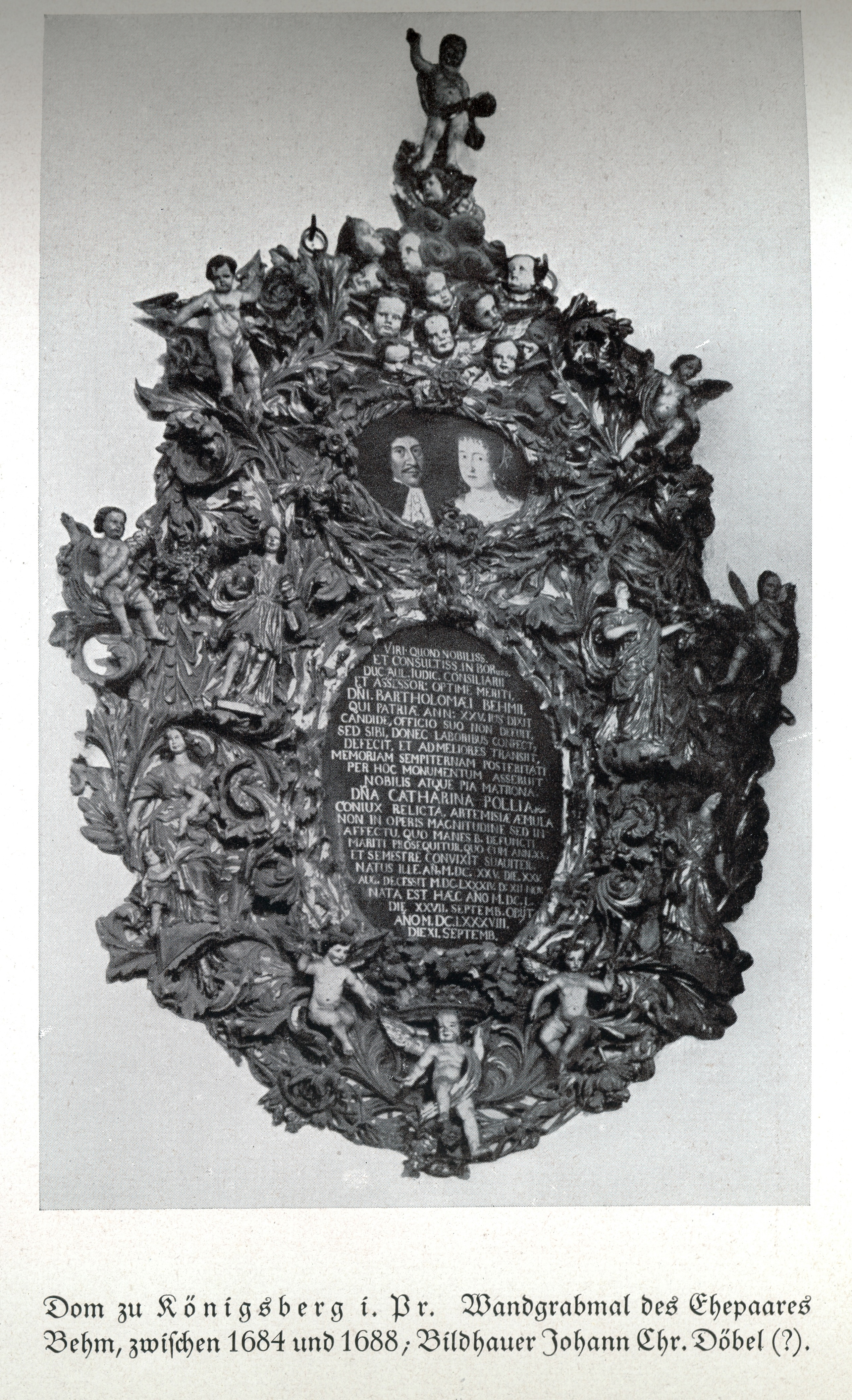 Königsberg, Dom, Wandgrabmal des Ehepaares Behm, zwischen 1684 und 1688, Bildhauer Johann Chr. Döbel (?)